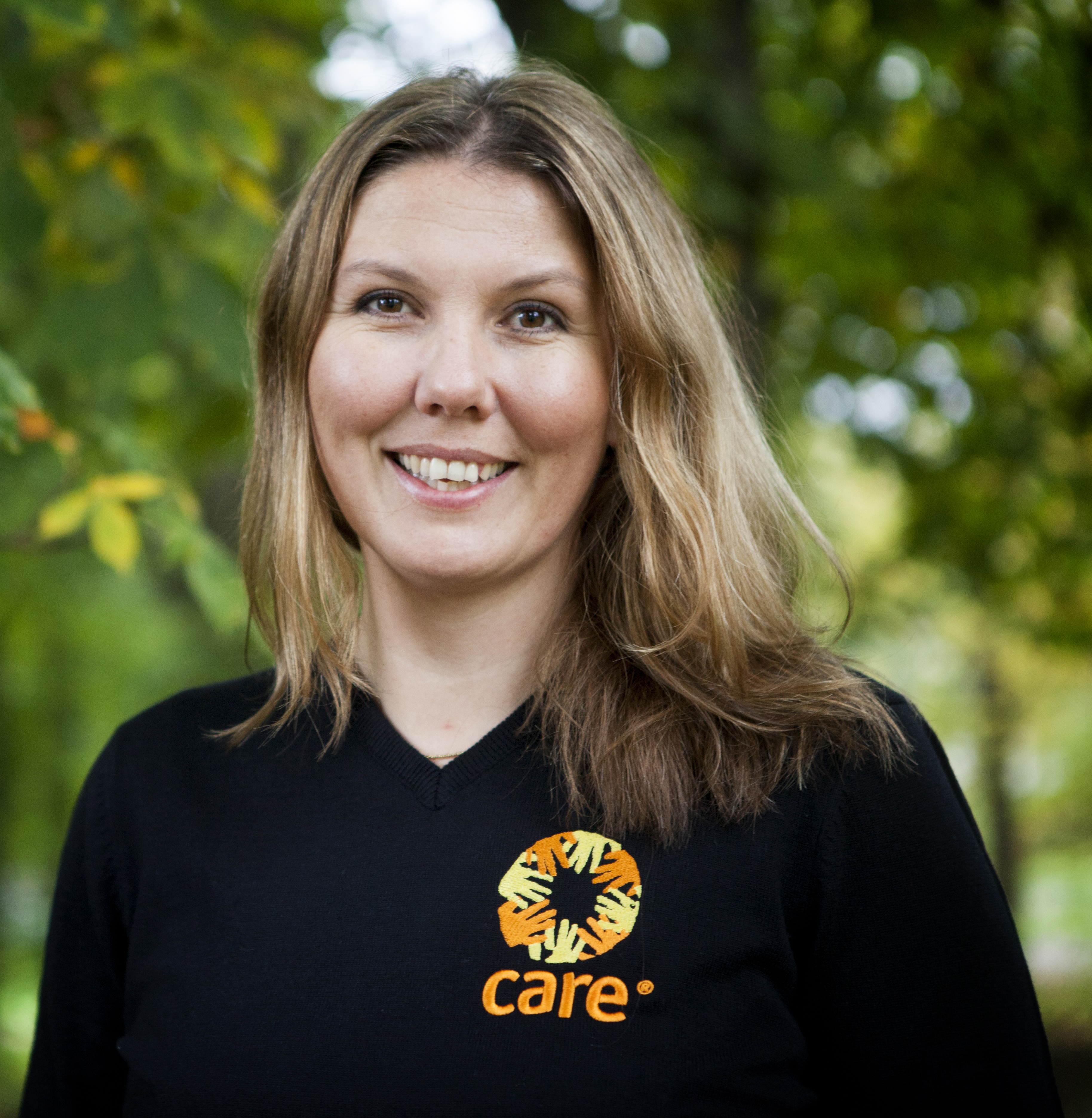 Gry Larsen. Foto: Gregory Rødland Buick